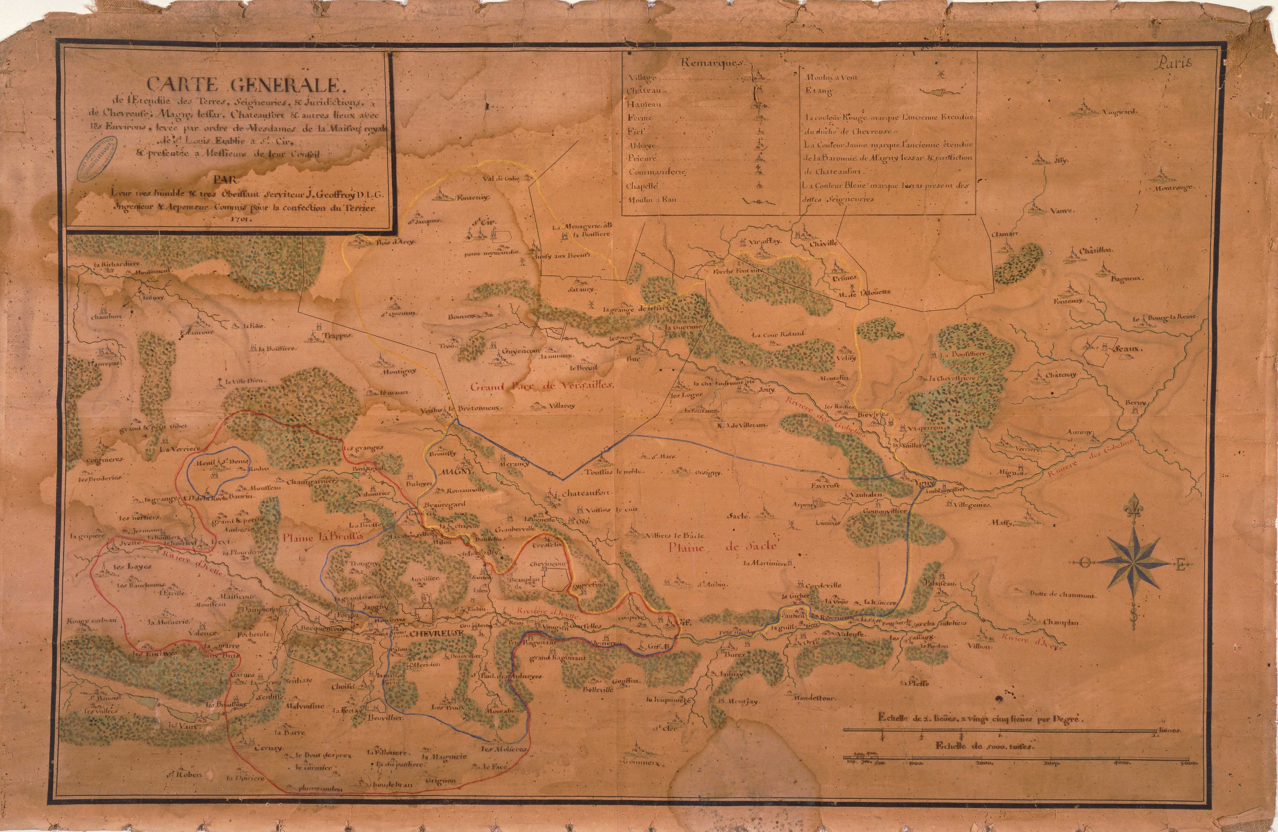 Les fiefs de Sous-Forêt (Bergerac) et Mauvière se distinguent à l'ouest (gauche) de CHEVREUSE